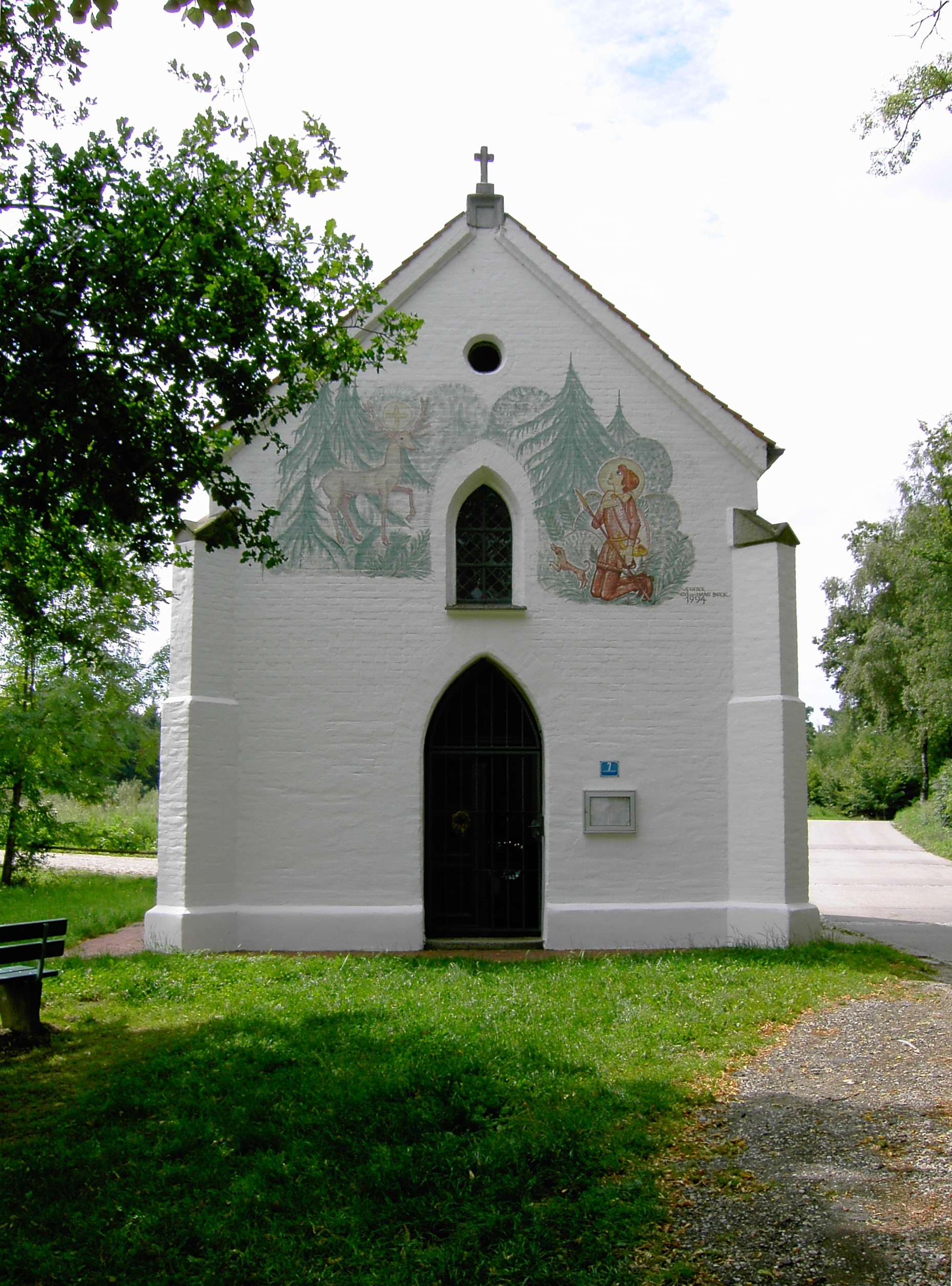 Wallfahrtskapelle Heimlichleiden in der Gemeinde Loiching in Niederbayern.